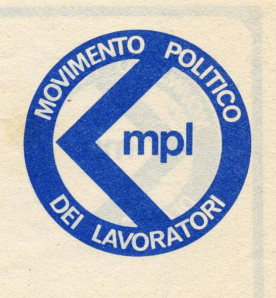 Simbolo del Movimento Politico dei Lavoratori adottato nel 1972